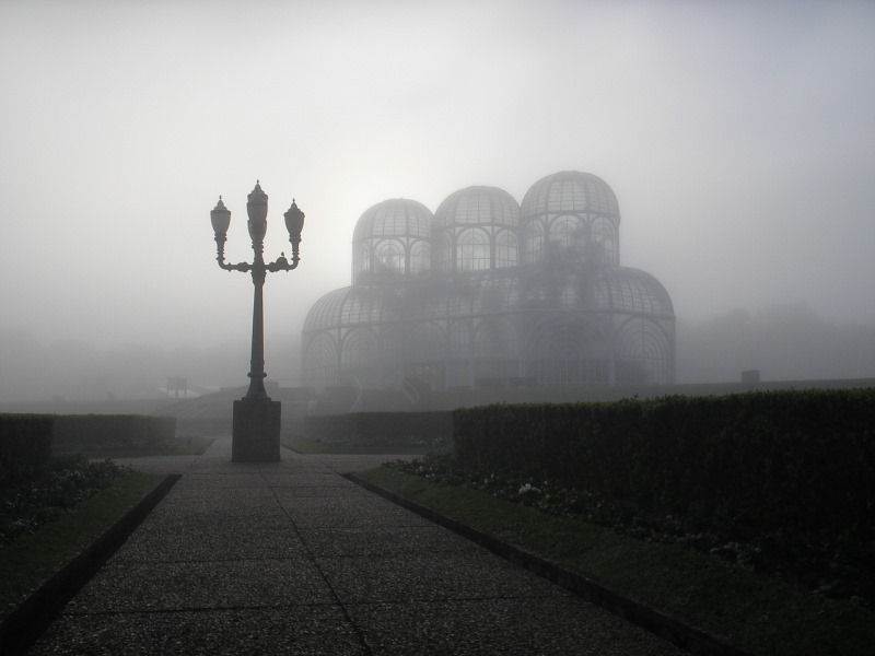 Neblina numa manhã fria no Jardim Botânico de Curitiba, PR, Sul do Brasil.